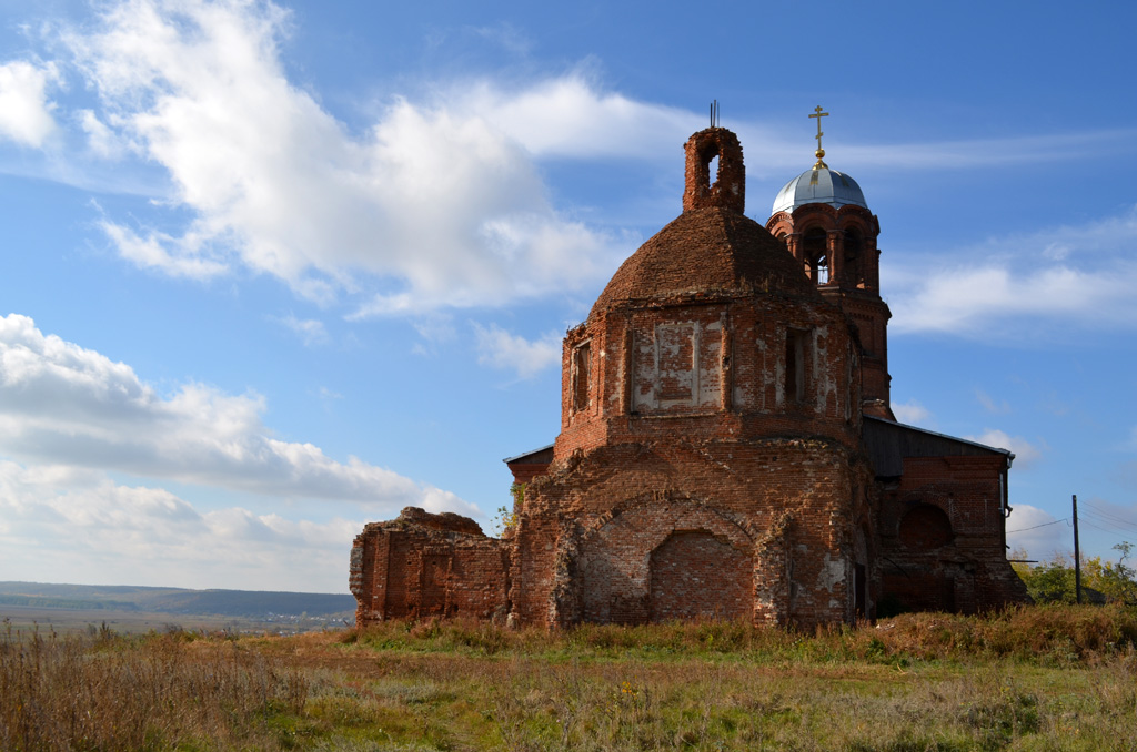 Покровская церковь в Боброве